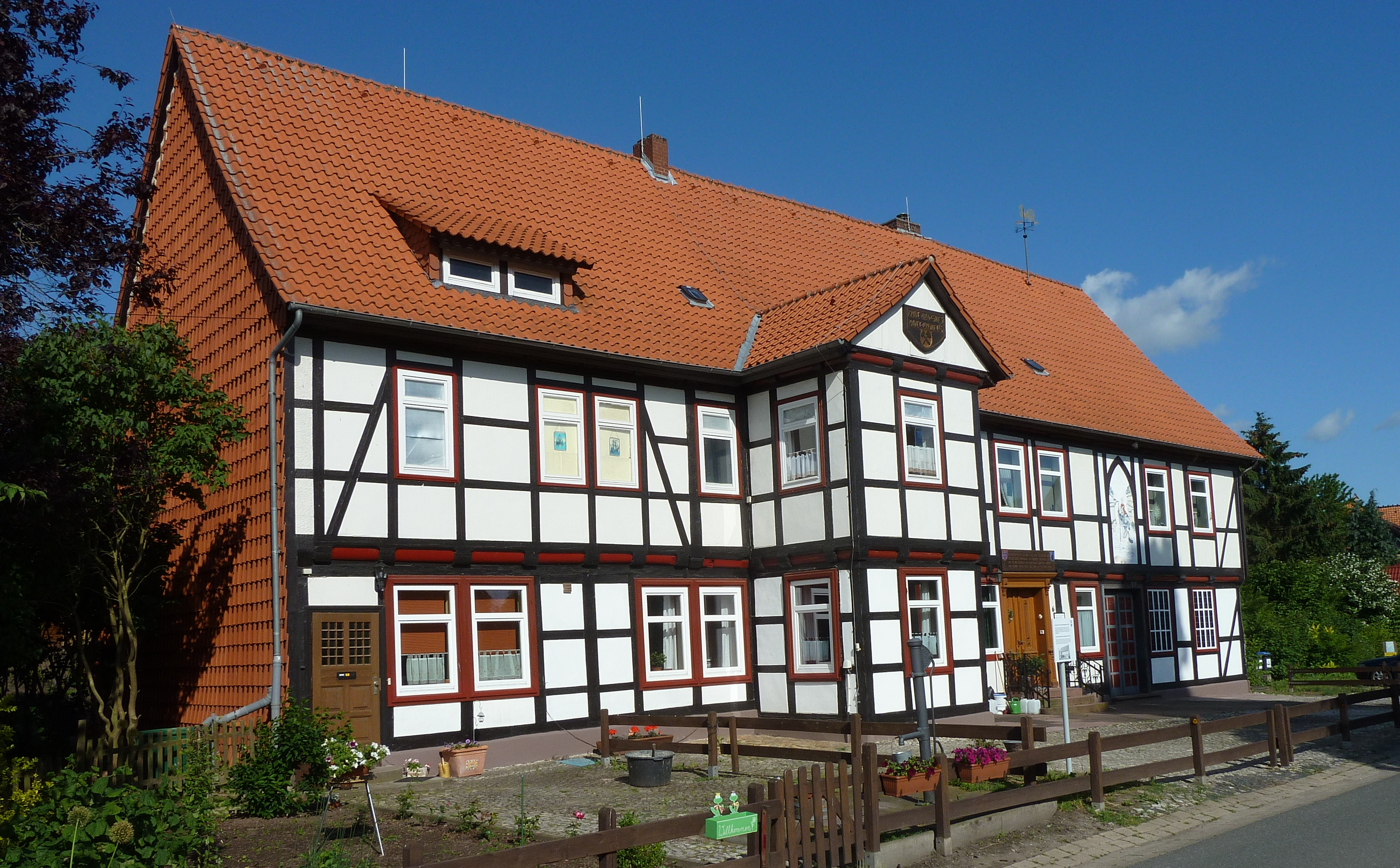 Faktoreihaus der Saline Sülbeck in Sülbeck, Stadt Einbeck, Südniedersachsen. In diesem Gebäude befanden sich die Schreibstube und weitere Gesachäftsräume, im rechten Teil auch die Salinenkapelle. Erbaut 1694